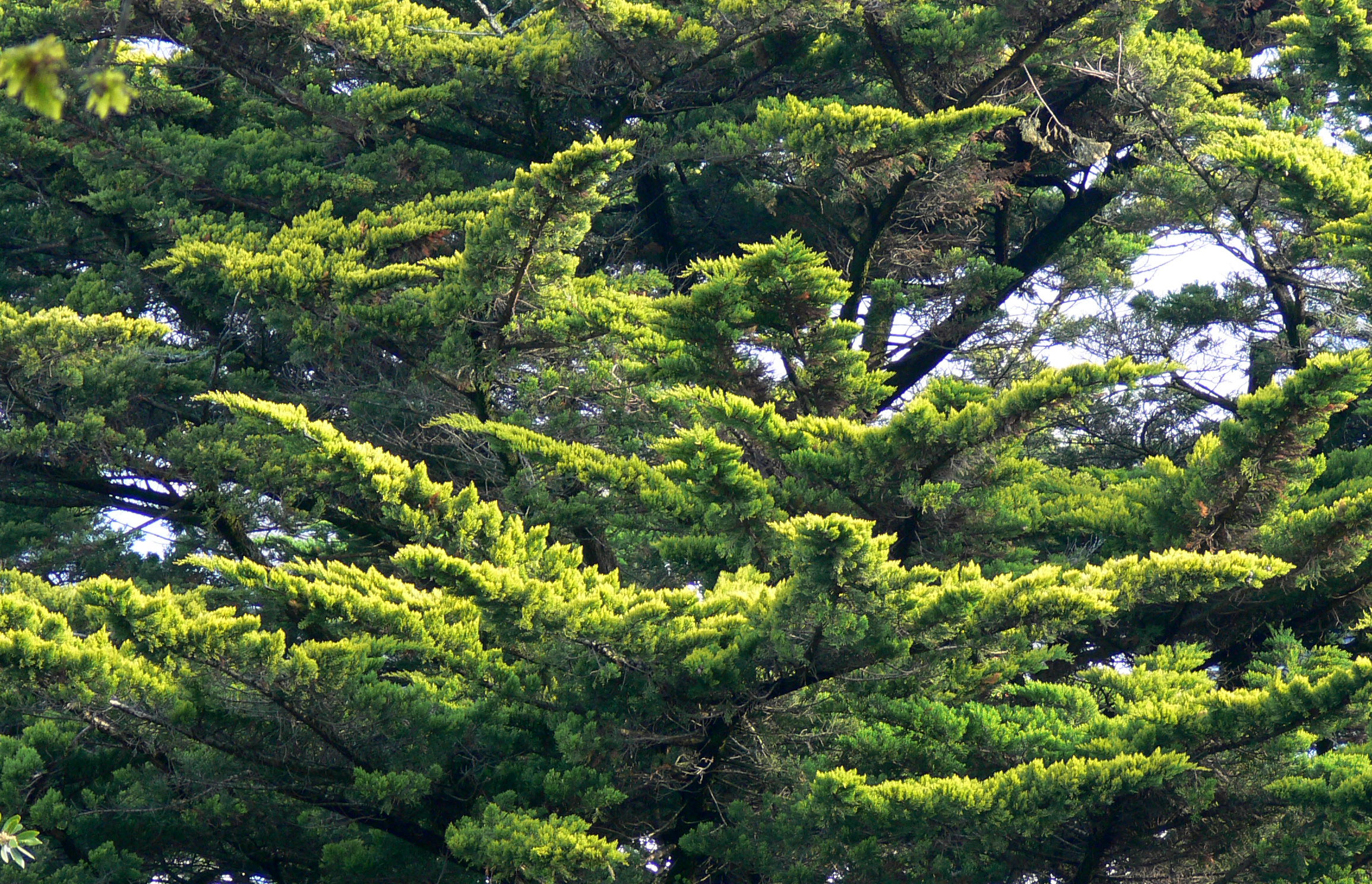 Port et couleurs caractéristiques du Cupressus macrocarpa 'Lutea', ici à Auray (Morbihan, Bretagne, France)